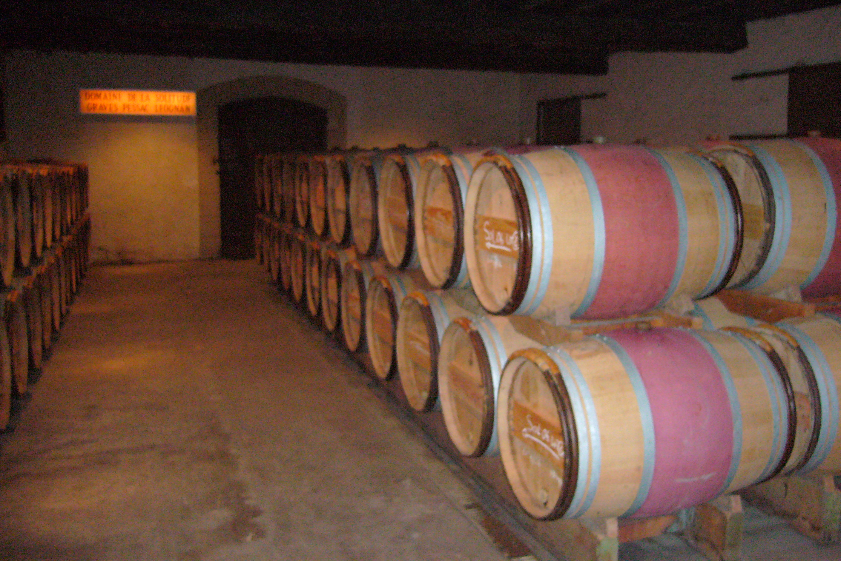 Cave Rouge Domaine de la Solitude (france) AOC Pessac-Leognan